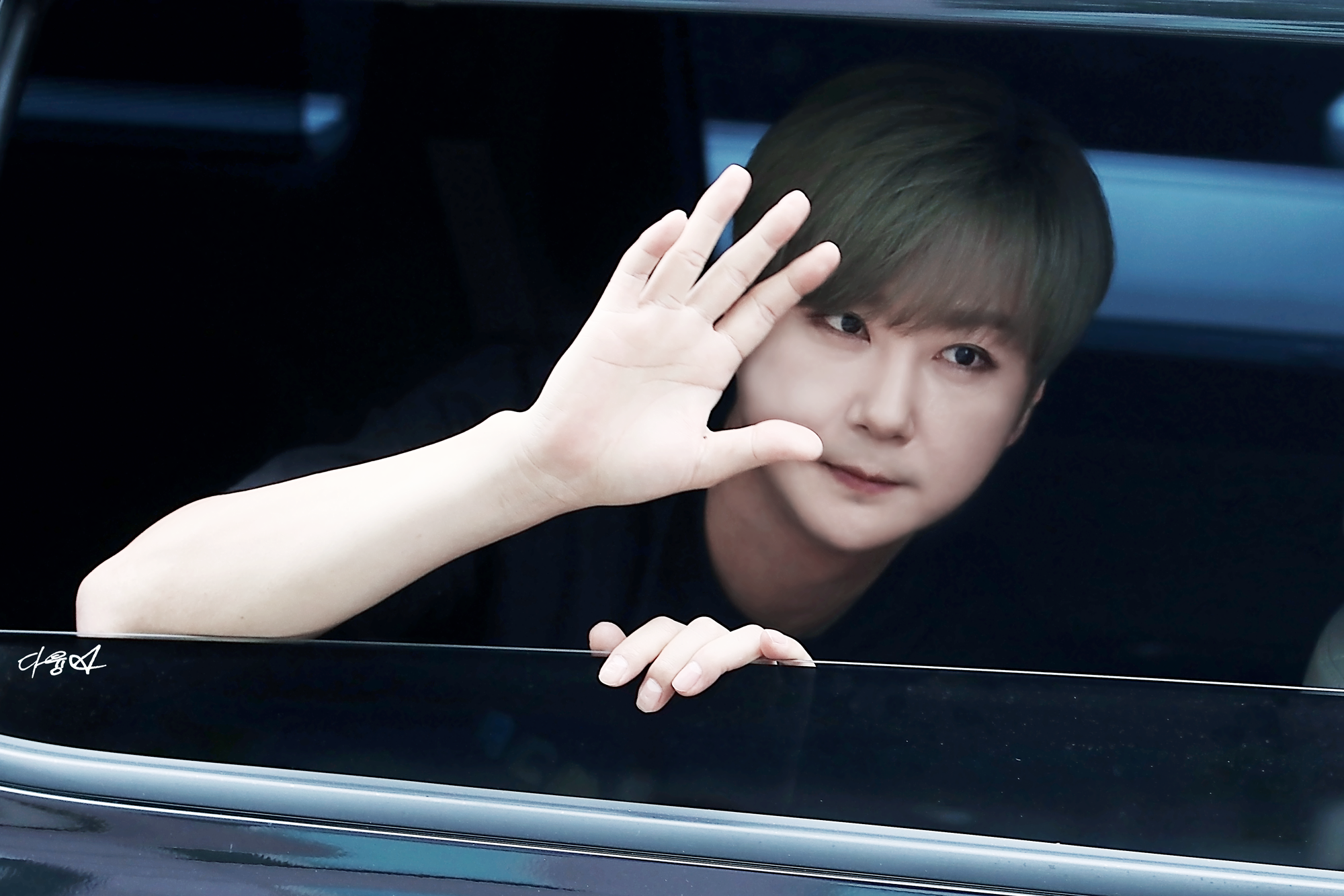 180902 인기가요 퇴근길